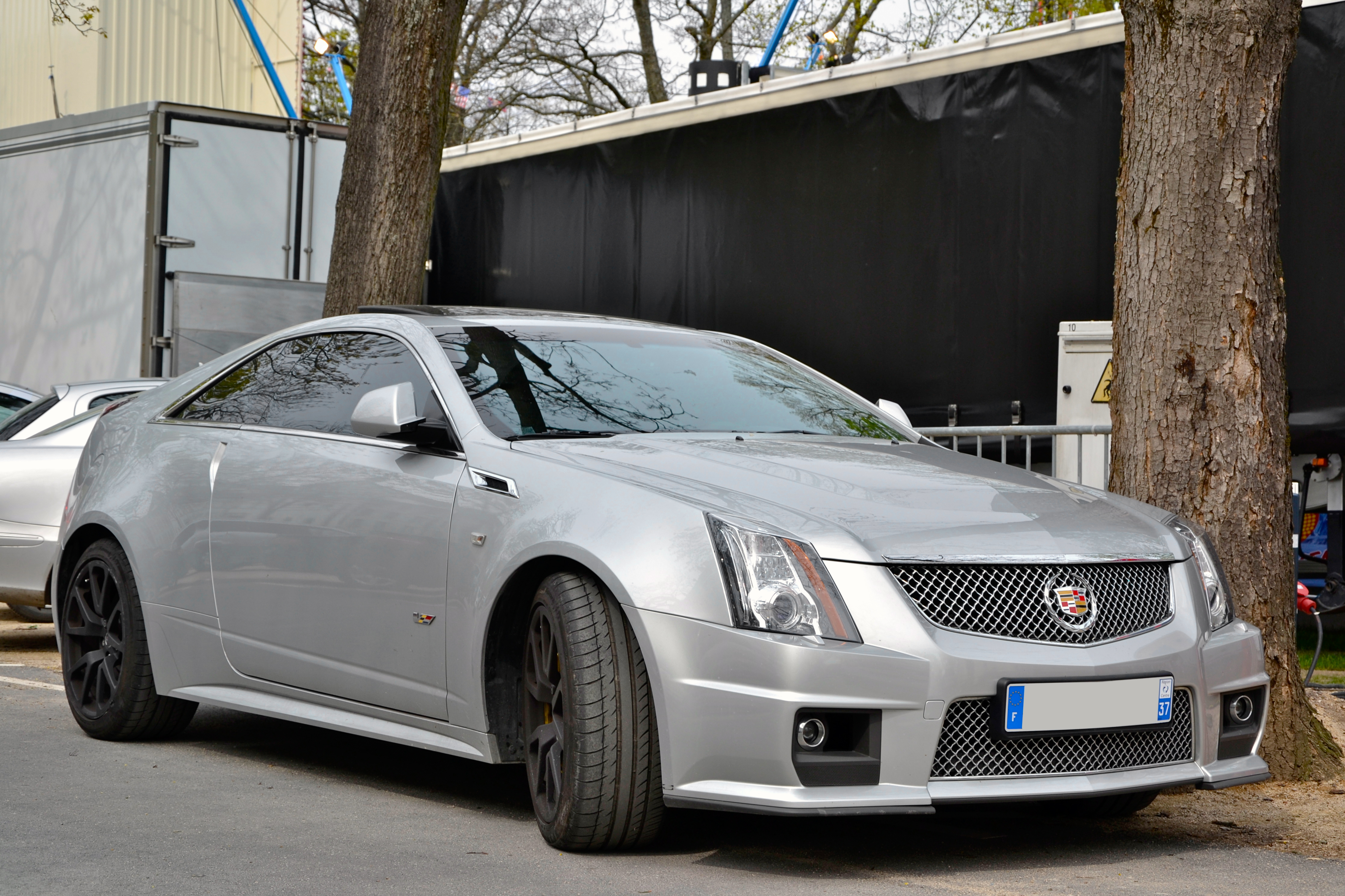 Cadillac CTS-V